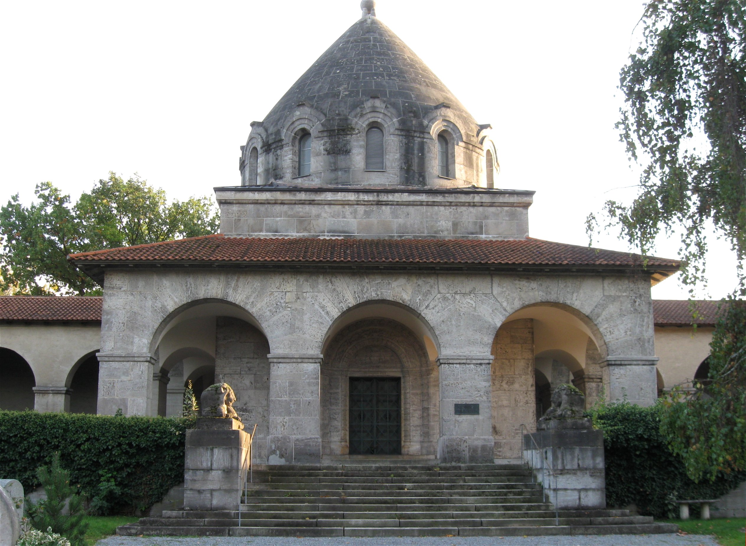 Friedenstraße 12; Nähe Bischof-Konrad-Straße; Evangelischer Zentralfriedhof, parkähnliche Anlage, 1897/98 von Richard Erhardt und Conrad Mayer; Dörnberg-Mausoleum, Zentralbau mit flankierenden Arkadengängen, Terrasse und Freitreppe mit flanierenden Löwen, Muschelkalk, in streng reduzierten romanisierenden Formen, 1911-15 von German Bestelmeyer; Brunnen, runde Schale mit Kugelbekrönung auf profilierten Stützen und rundem Unterbau, Kalkstein, 1911-15 von German Bestelmeyer; ehem. Bethalle, abgewinkelter und eingeschossiger Walmdachbau mit Attika und Pilastergliederung, neubarock, 1898; Nordportal, triumphbogenartiges dreitoriges Portal mit Putzgliederungen und Aufsatz, bez. 1898; Friedhofskreuz, Kruzifix im Dreinageltypus, Gusseisen, 1899 von Anton Heß; dreizehn gusseiserne Pumpbrunnen mit Wasserbecken, bez. 1897